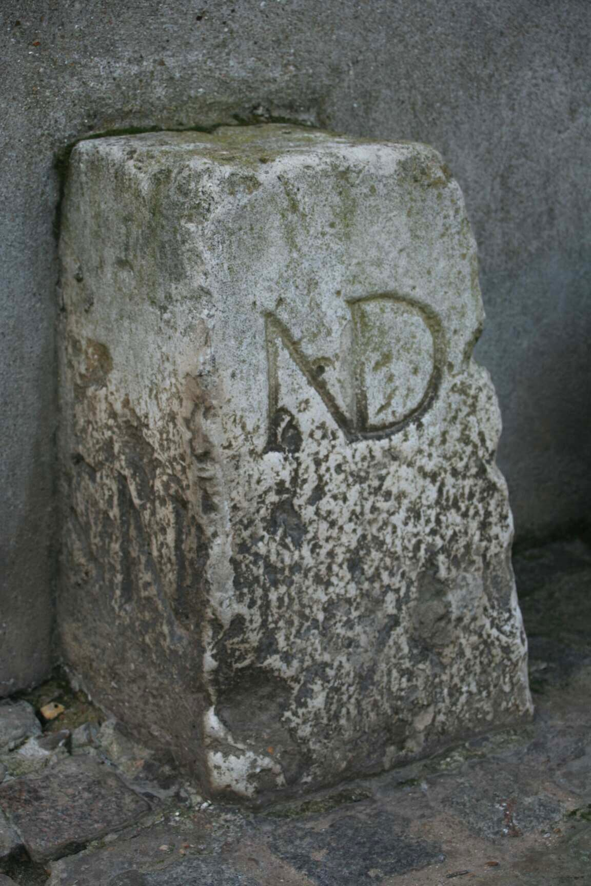 ancienne borne (XVIIe siècle) située rue d'Antar à Épône (France), portant la marque ND (Notre-Dame)